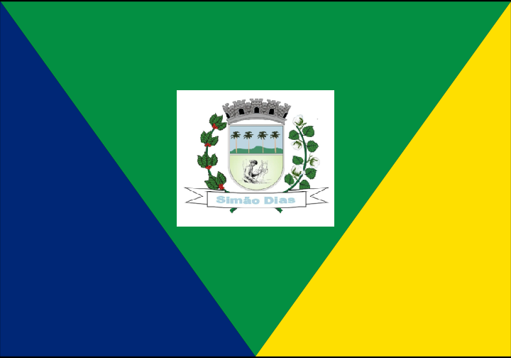 Bandeira de Simão Dias